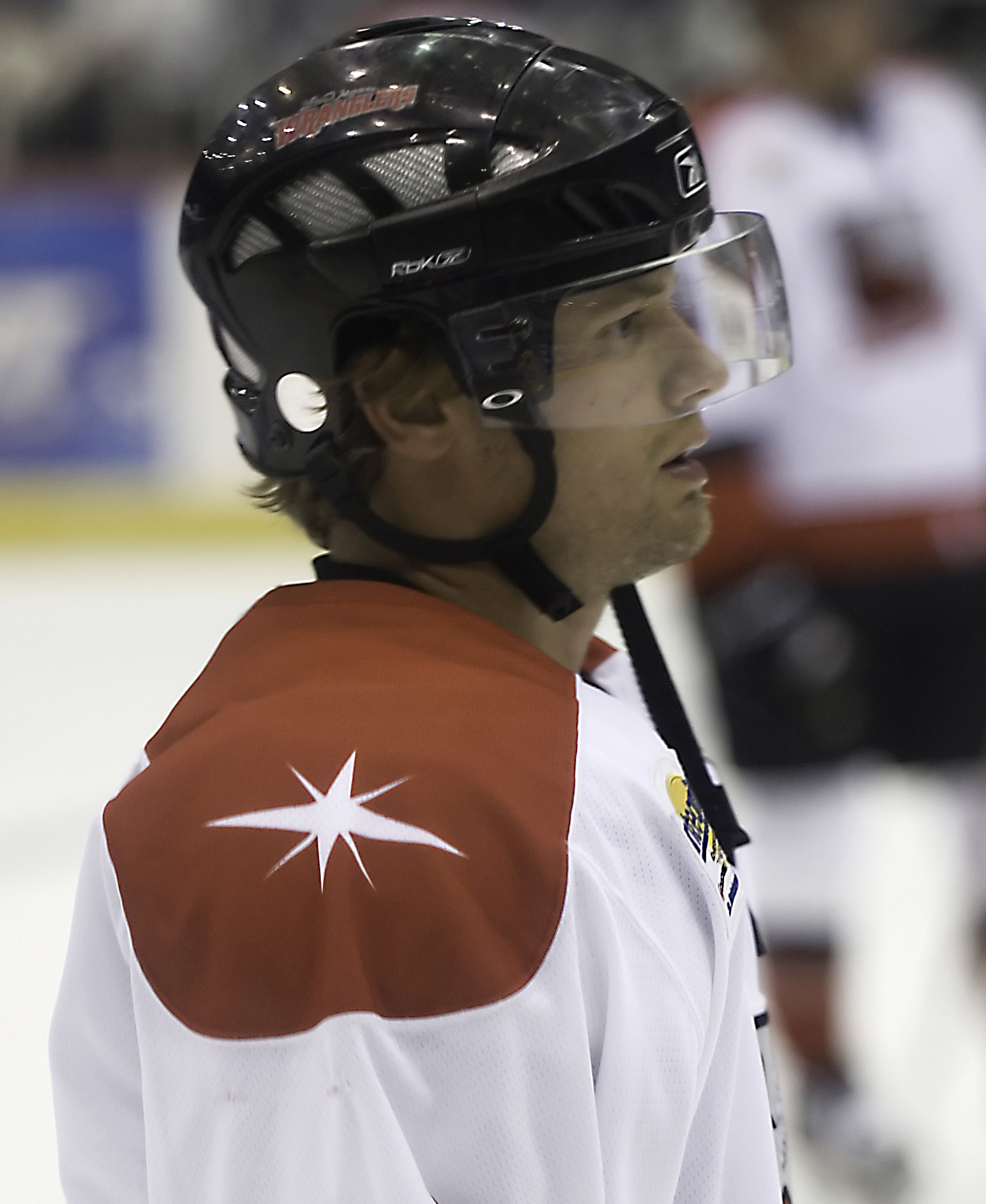 Tyler Mosienko